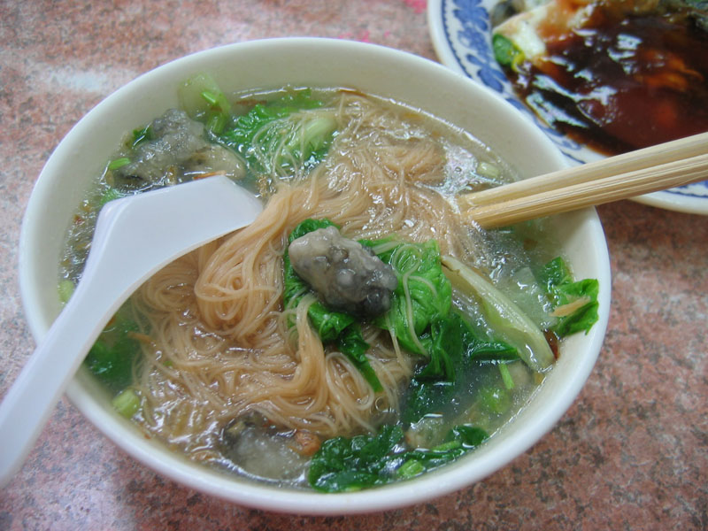 鹿港的蚵仔麵線Bân-lâm-gú: Lo̍k-káng ê ô-á-mī-suànn